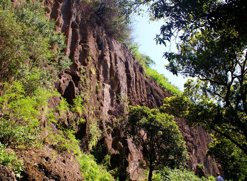 Appercu de la falaise